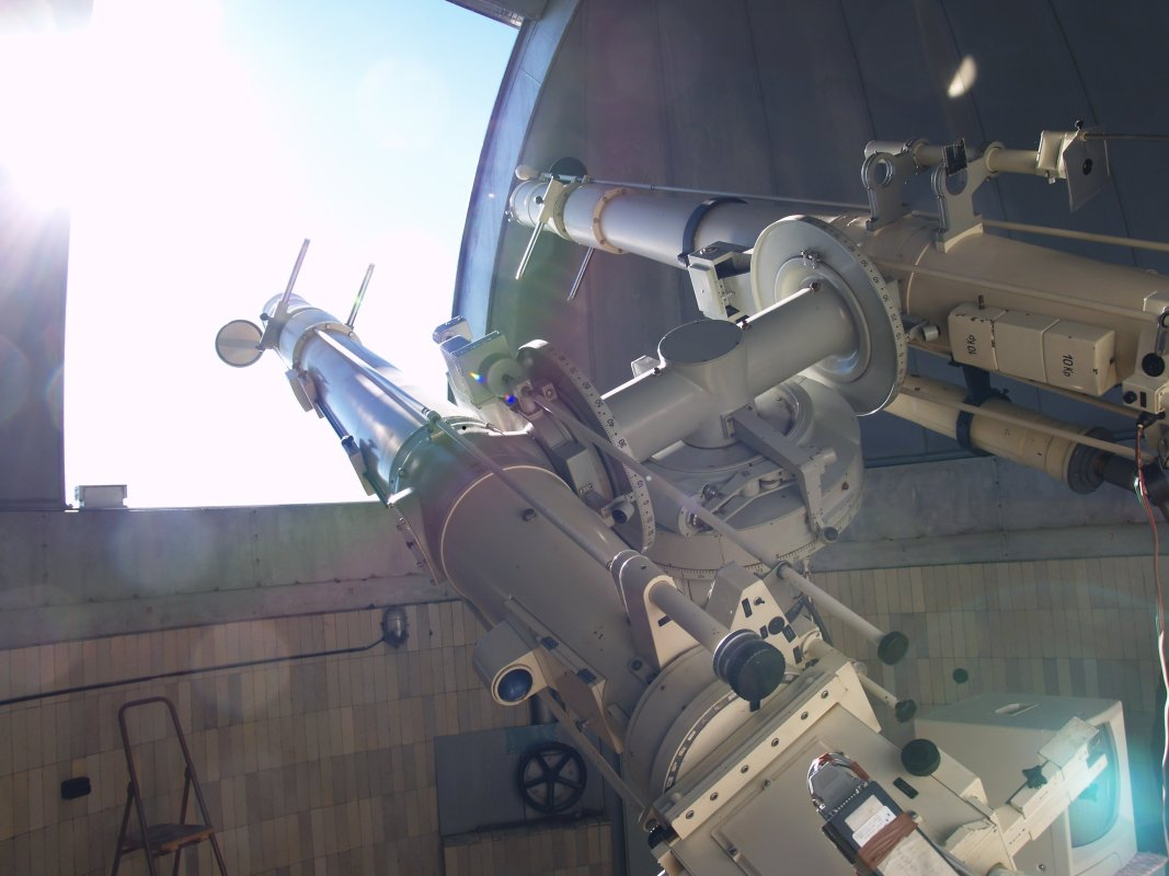 koronografy Observatória Lomnický Štít